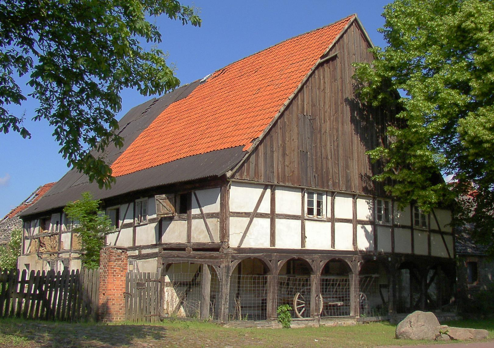 Vorlaubenhaus (Dorfstr. 44) in Parsteinsee-Lüdersdorf in Brandenburg, Deutschland